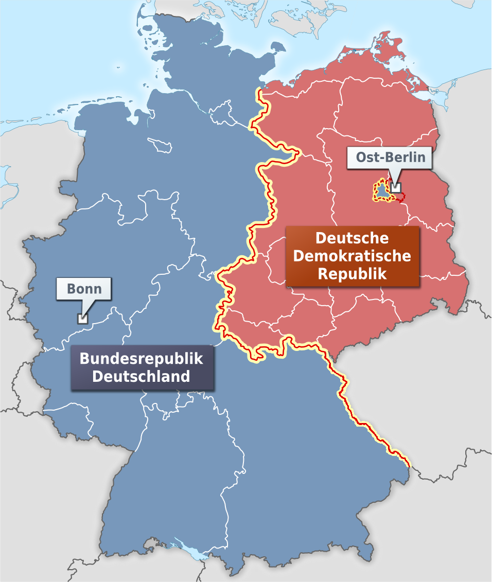 Zonenrandgebiet der Bundesrepublik Deutschland zwischen 1949 und 1990. Zusätzlich sind die Grenzen der Bundesländer der BRD und Bezirke der DDR eingezeichnet.